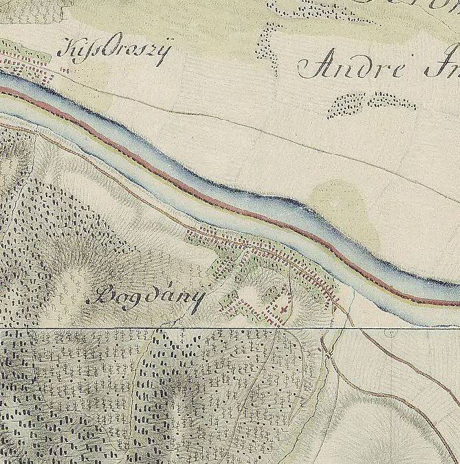 Dunabogdány az I. katonai felmérésen (1763-1785)